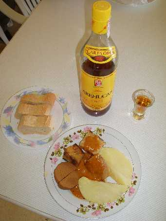 sancocho canario con ron arehucas